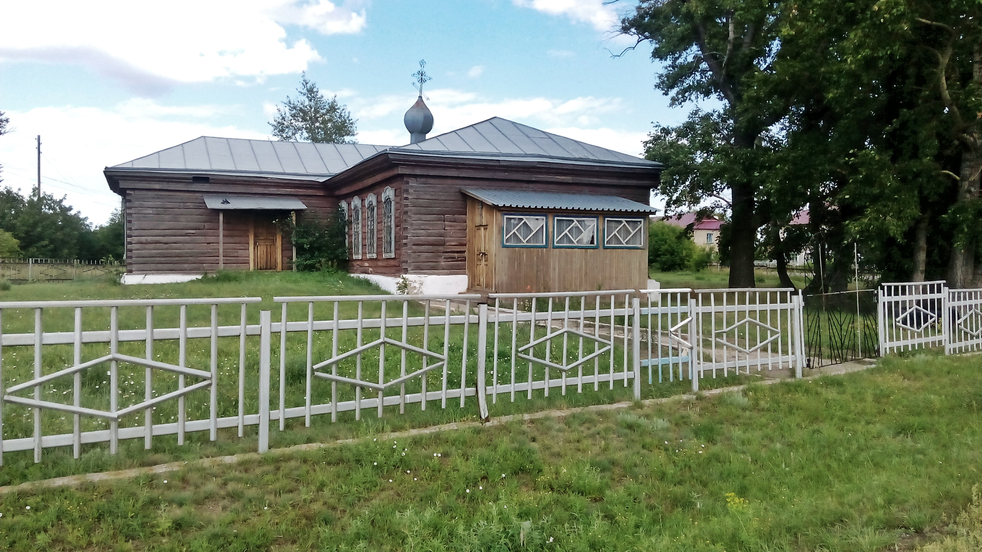 Сельская церковь (заброшена)